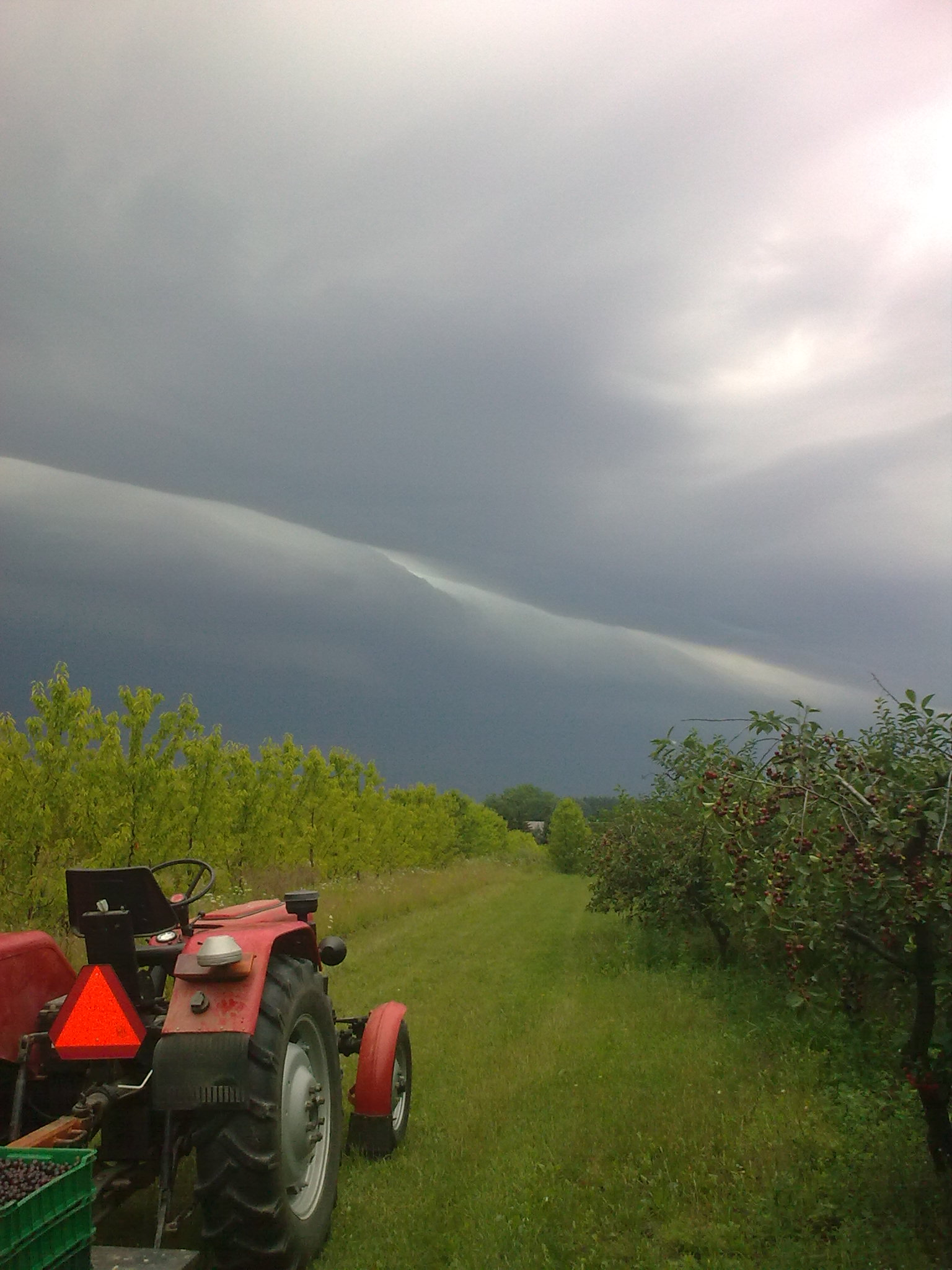 sady Grójeckie